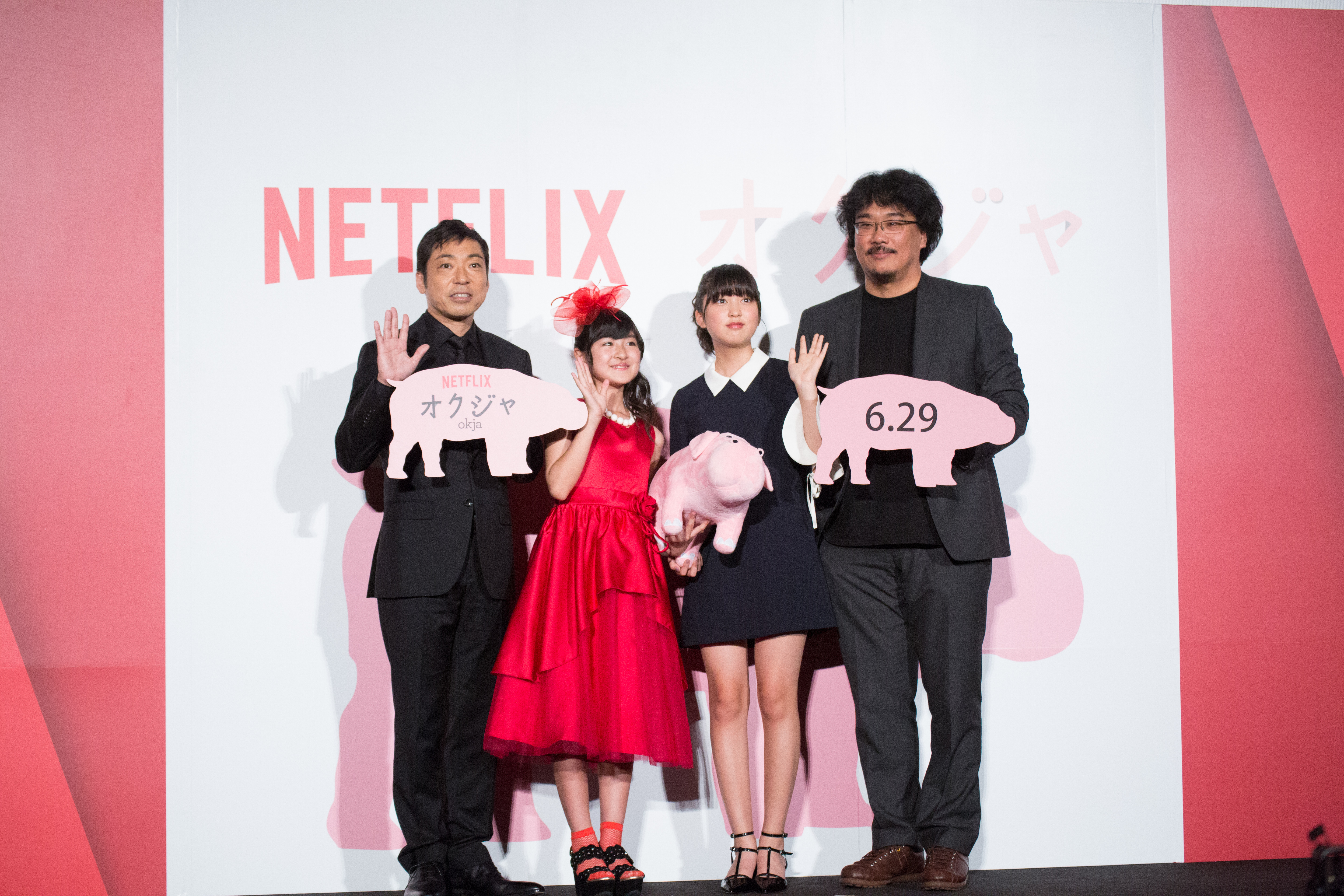 オクジャ/okja ジャパン・プレミア 香川照之 小林星蘭 アン・ソヒョン ポン・ジュノ